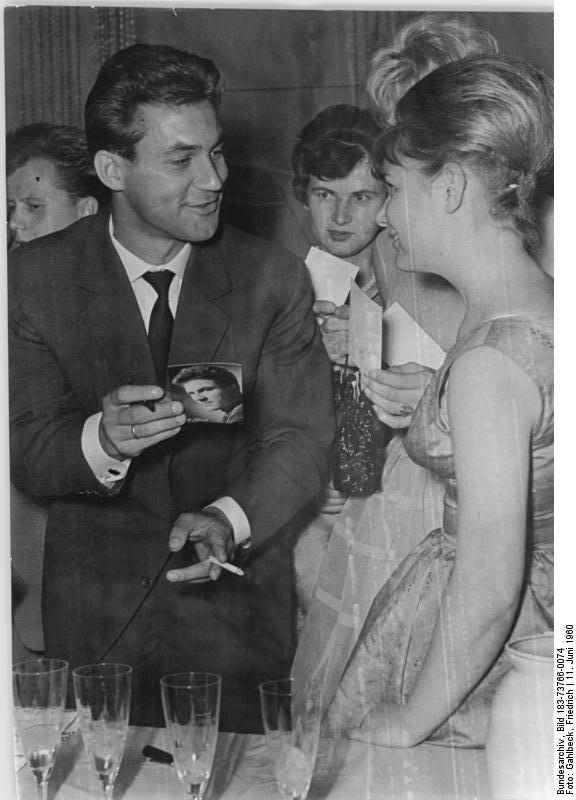 Zentralbild Gahlbeck 13.6.1960 2. Arbeiterfestspiele des FDGB. Filmforum und Filmball zu den Arbeiterfestspielen in Aue. Das Filmforum und der Filmball hatte am 11.6.1960 viele Hundert in das Wismut-Kulturhaus in Aue gelockt. Zahlreiche prominente DEFA-Künstler waren erschienen, unter ihnen Professor Wilkening, Leiter des DEFA-Spielfilmstudios, Raimund Schelcher, Erich Franz, Hans Lucke, Dieter Perlwitz, Willi Schrade und Erich Veldre sowie Harry Hindemith, Rolf Ludwig und Marianne Wünscher. Stürmisch begrüßt wurde der berühmte sowjetische Regisseur Sergei Jutkewitsch. UBz: Willi Schrade unterhält sich mit Besucherinnen des Filmforums.